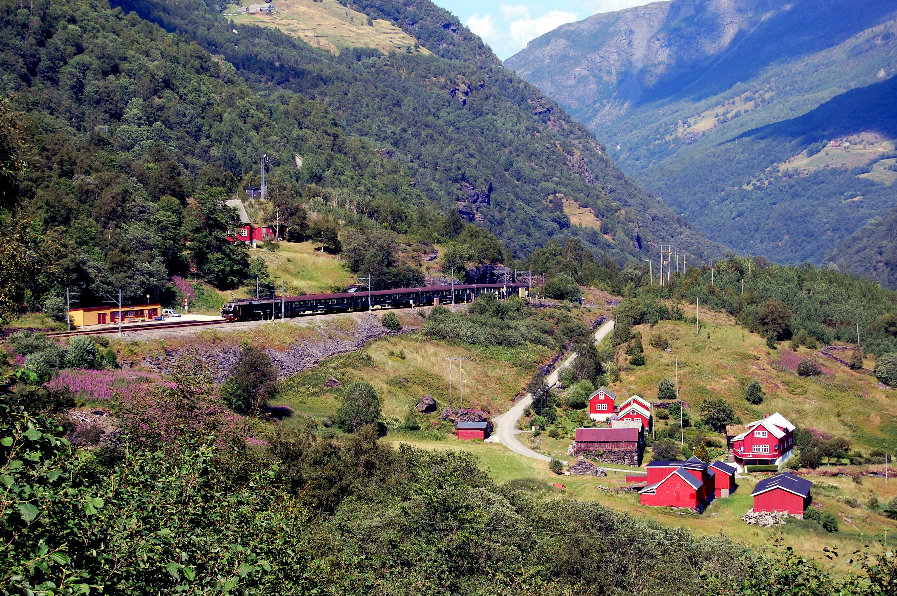 Flåmsdalen, Flåm, Norway